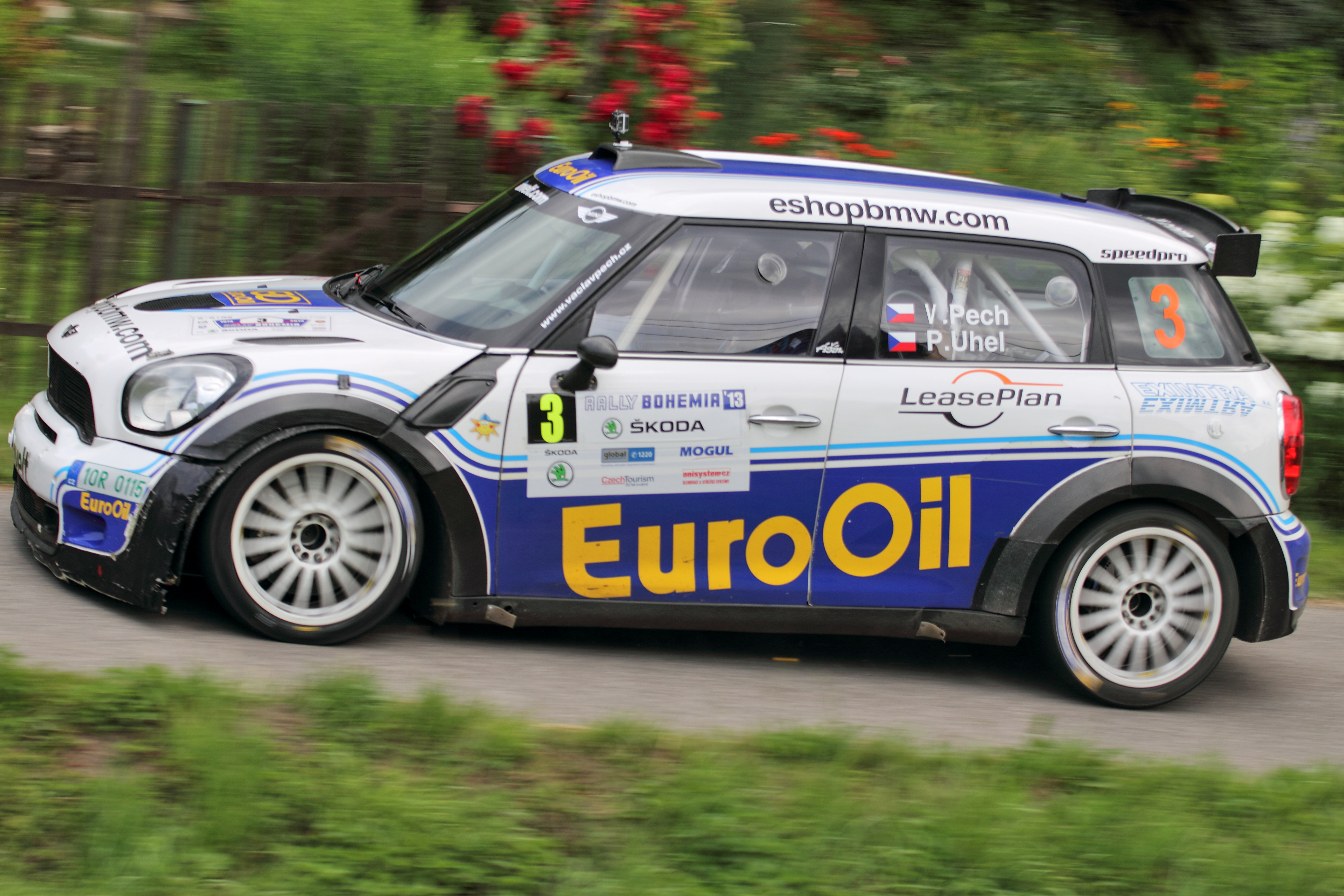 Václav Pech jun., Petr Uhel, Rally Bohemia, 2013